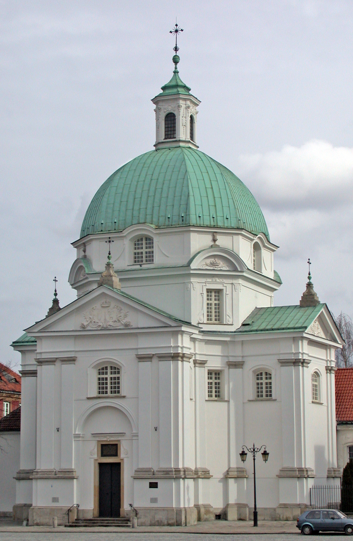 Varsavia, chiesa di San Casimiro (kóściół Św. Kazimierza), sulla Piazza del Mercato della Città Nuova (Rynek Nowego Miasta).